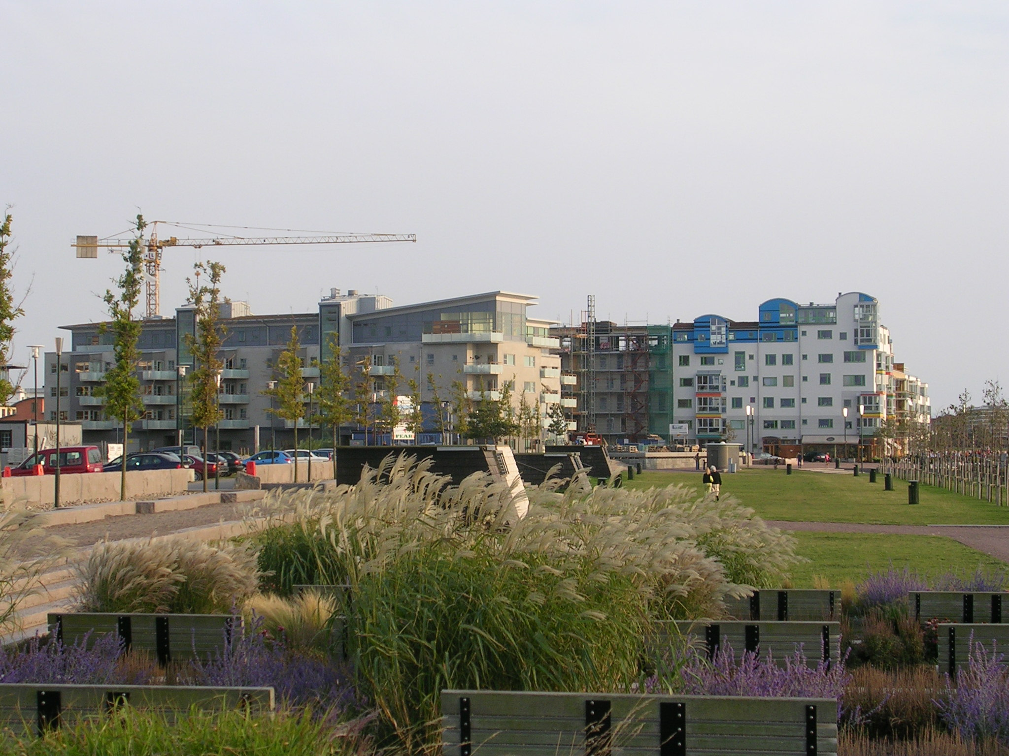 Västra hamnen i Malmö Date: September 2005 Author: Väsk